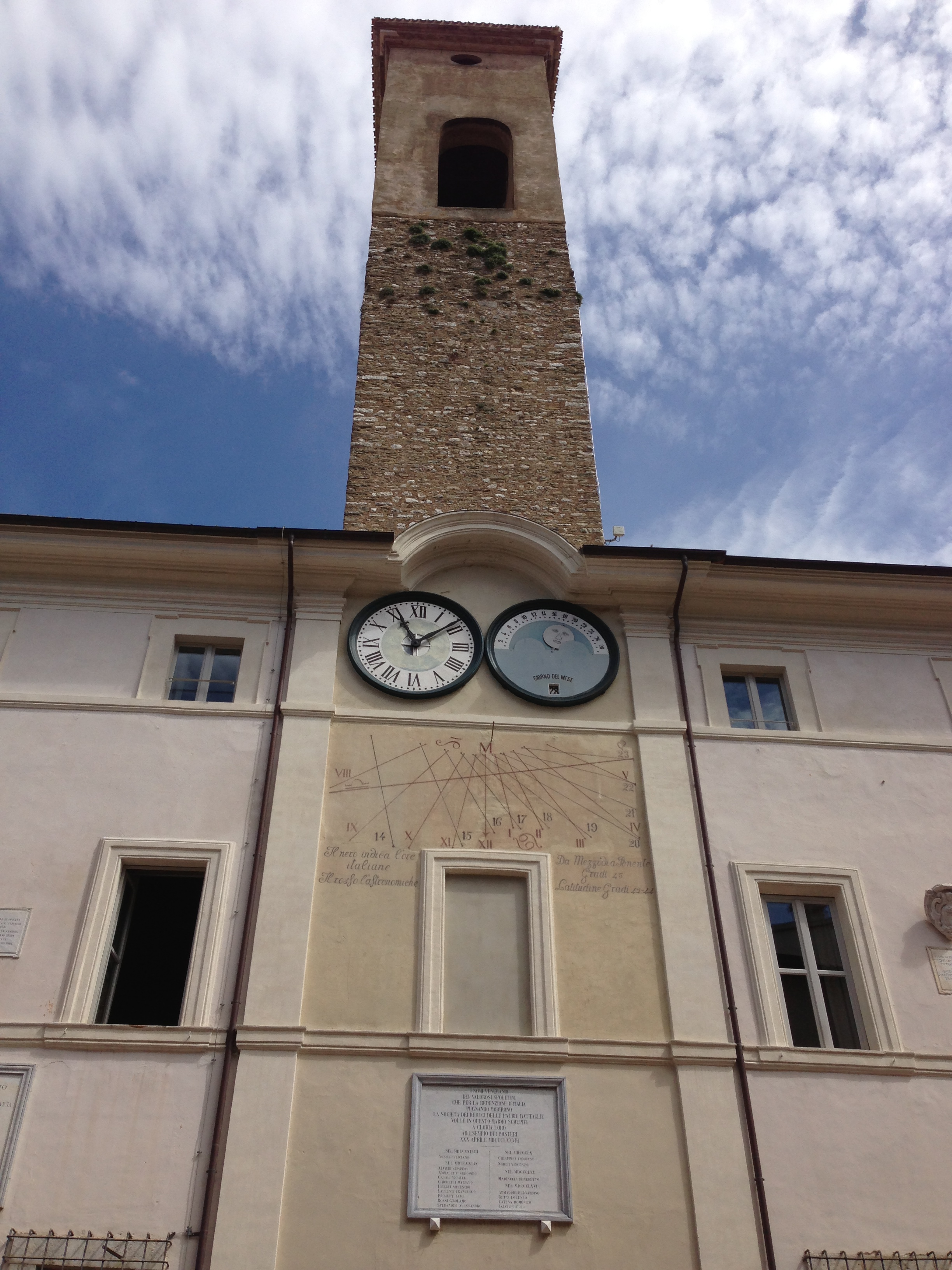 Palazzo del Comune. Spoleto